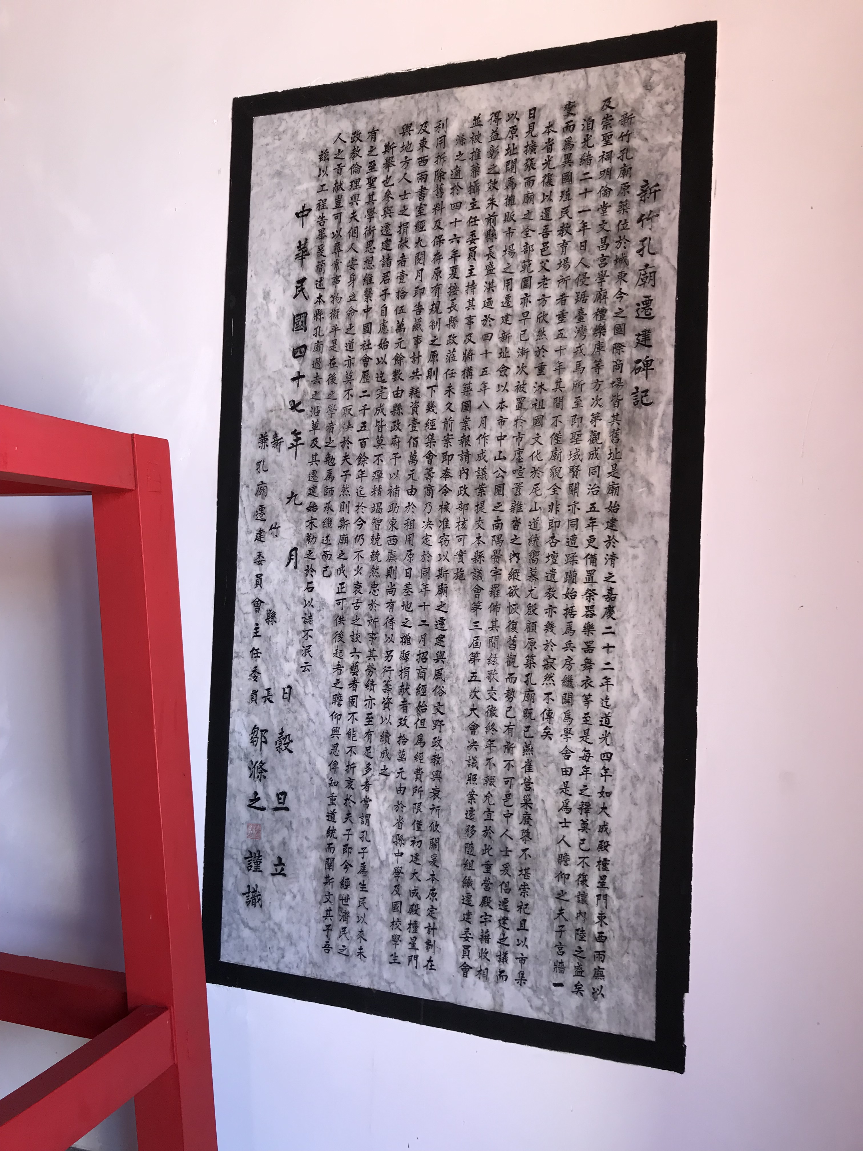 中文（台灣）: 新竹孔廟拆遷碑記